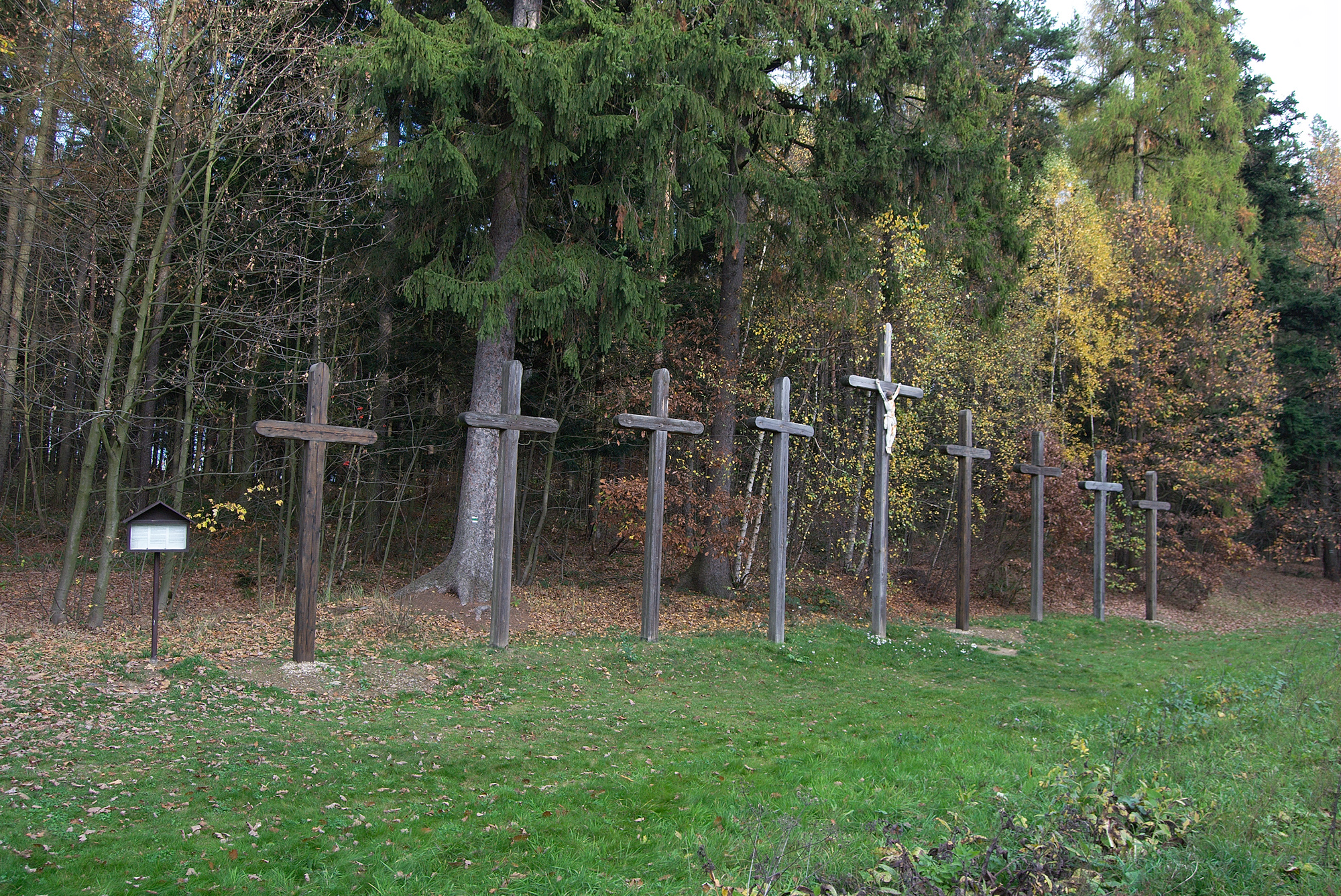 Legendárních Devět křížů, nacházejících se v katastru obce Lesní Hluboké